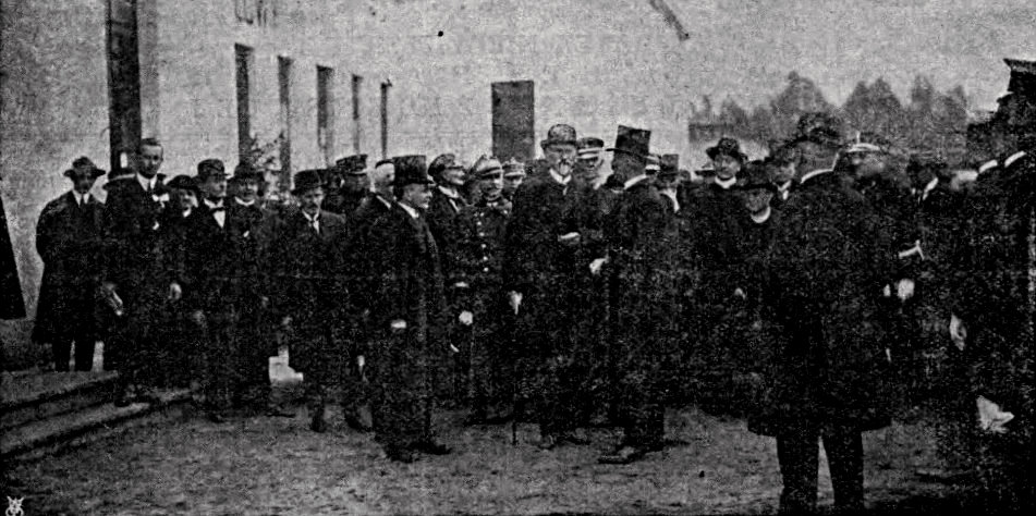 Podpis oryginalny: "Prezydent Wojciechowski zwiedza Wystawę".